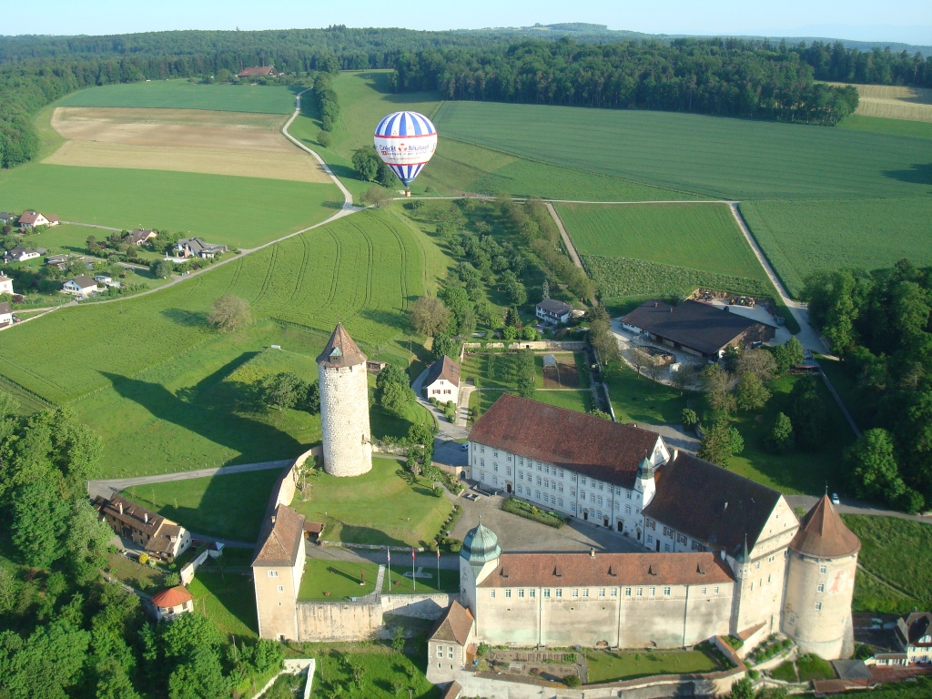 Vue aérienne depuis une montgolfière du château de Porrentruy (le 27/05/2012)